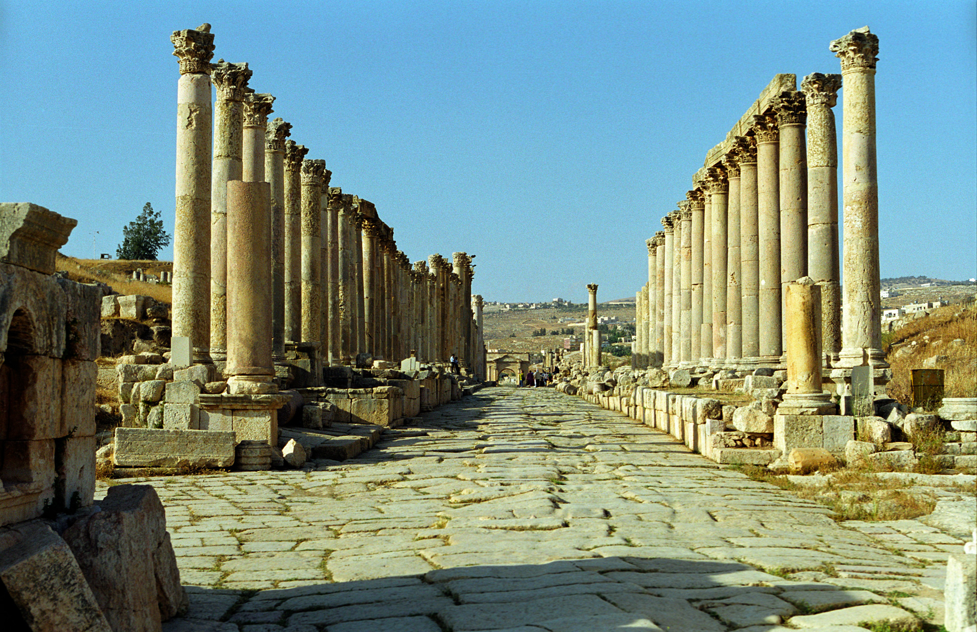 Jerash, Jordan